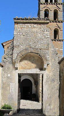 Ingresso chiesa di Santa Maria della Lode a Vescovio